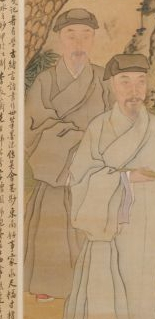 程嘉燧（1565年－1643年），字孟陽，號松圓老人、偈庵，直隸休寧（今屬安徽）人，明朝畫家。